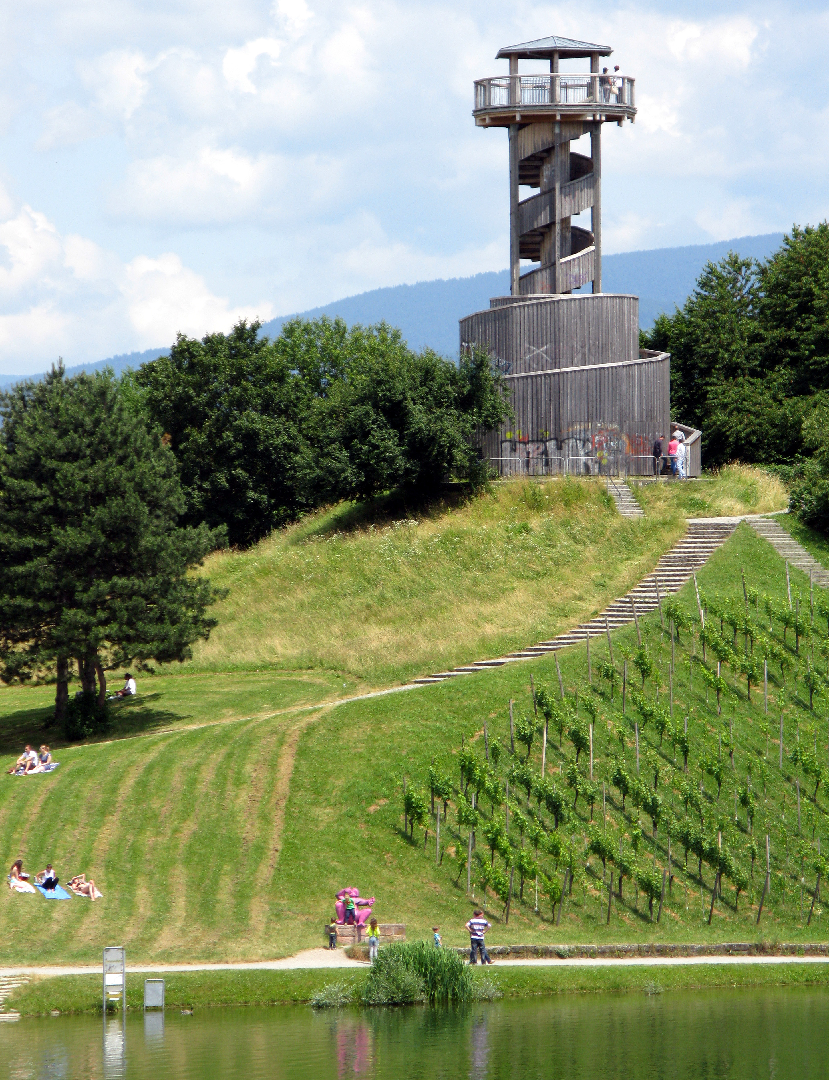 Seeparkturm in Freiburg vom "Forsthaus"